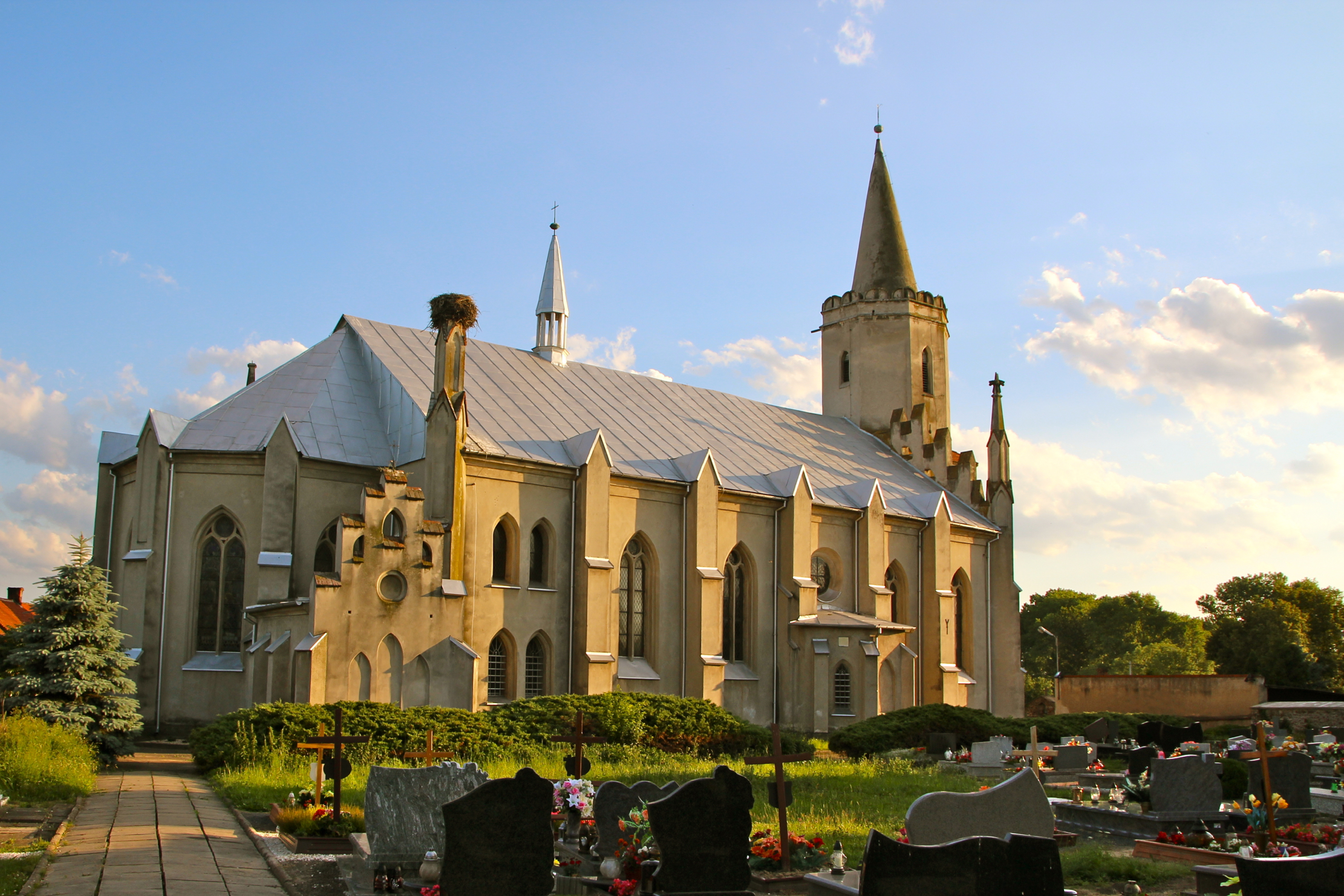 Kościół pw. św. Katarzyny w Dytmarowie – wieś w Polsce położona w województwie opolskim, w powiecie prudnickim, w gminie Lubrza.